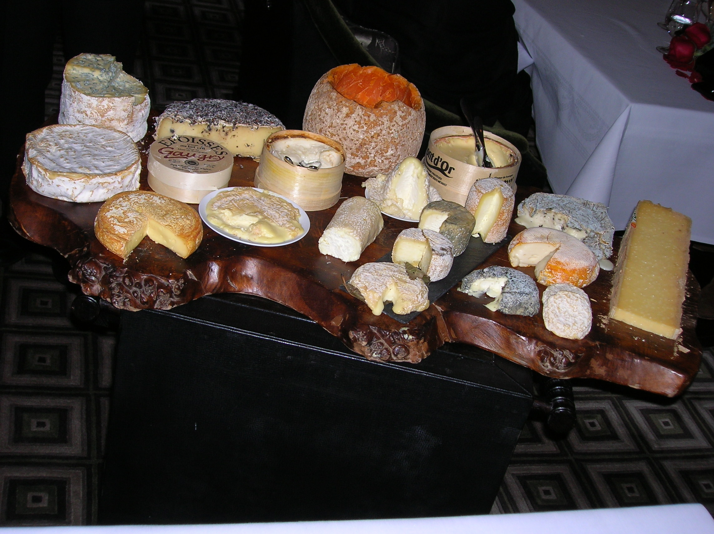 שולחן גבינות במסעדת קפריס בהונג קונג